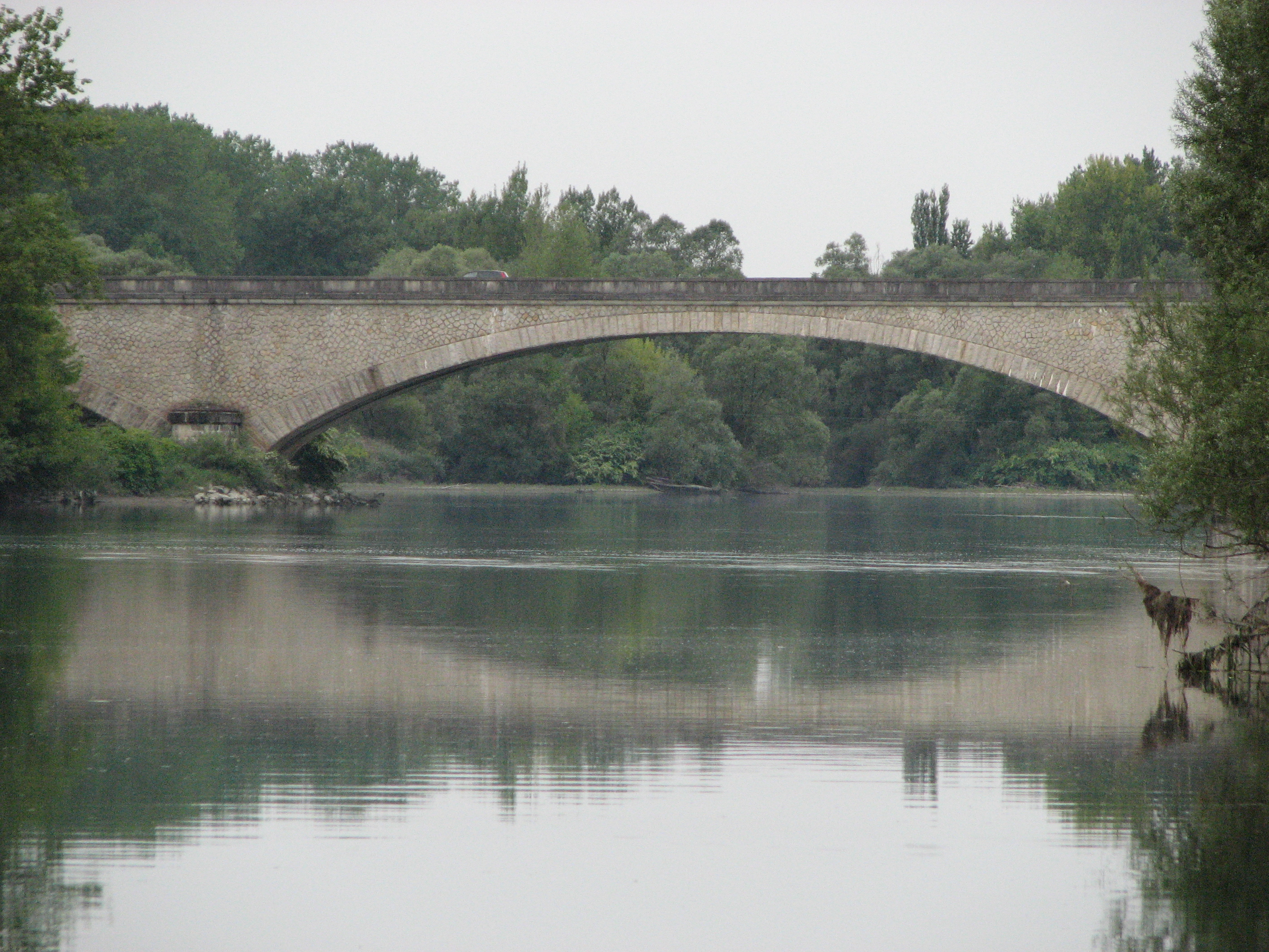 Pont d'Évieu sur le Rhône, entre l'Ain et l'Isère. Communes de Saint-Benoît et Les Avenières.